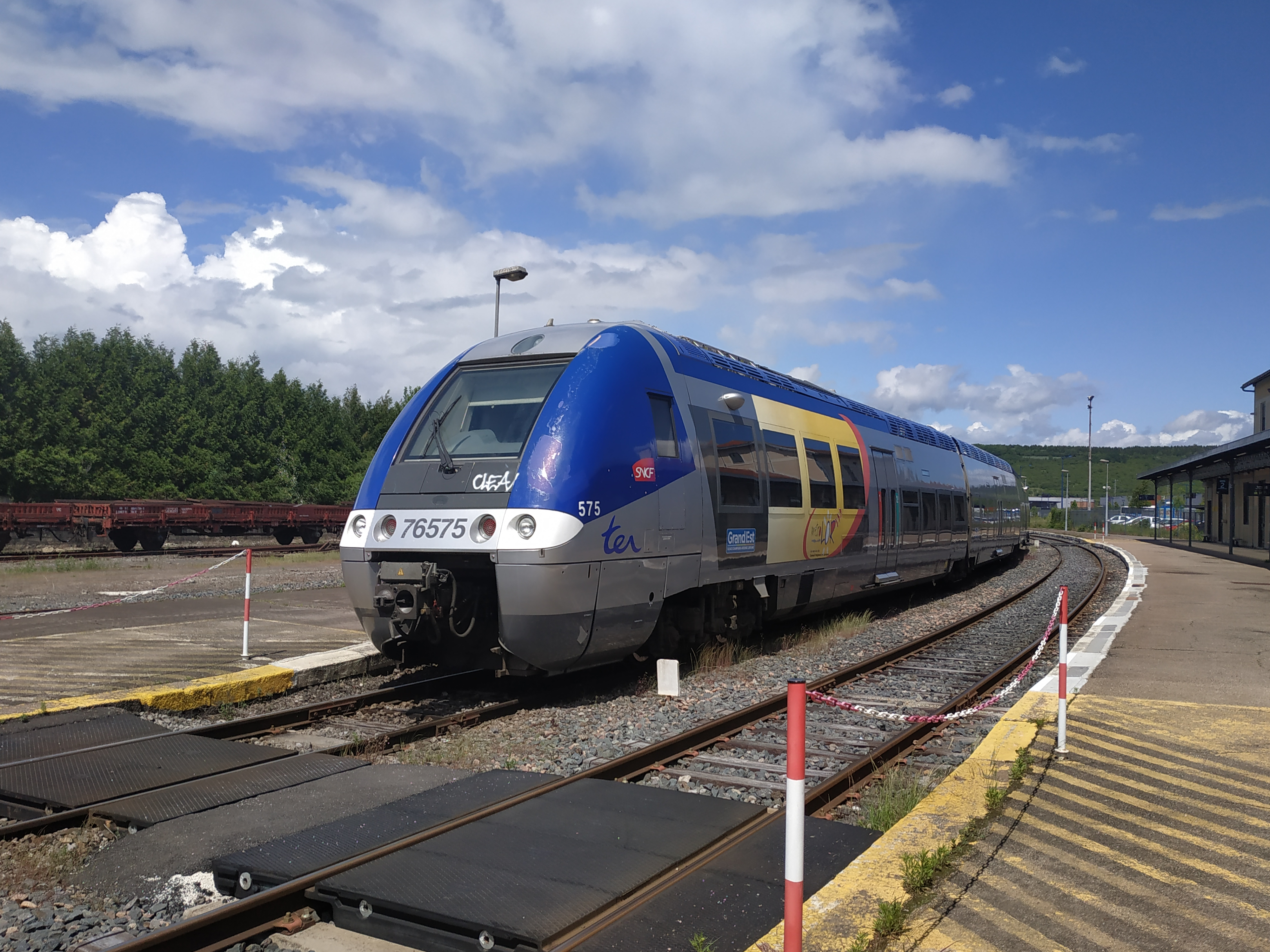 X76500 en livrée TER Lorraine en gare de Verdun